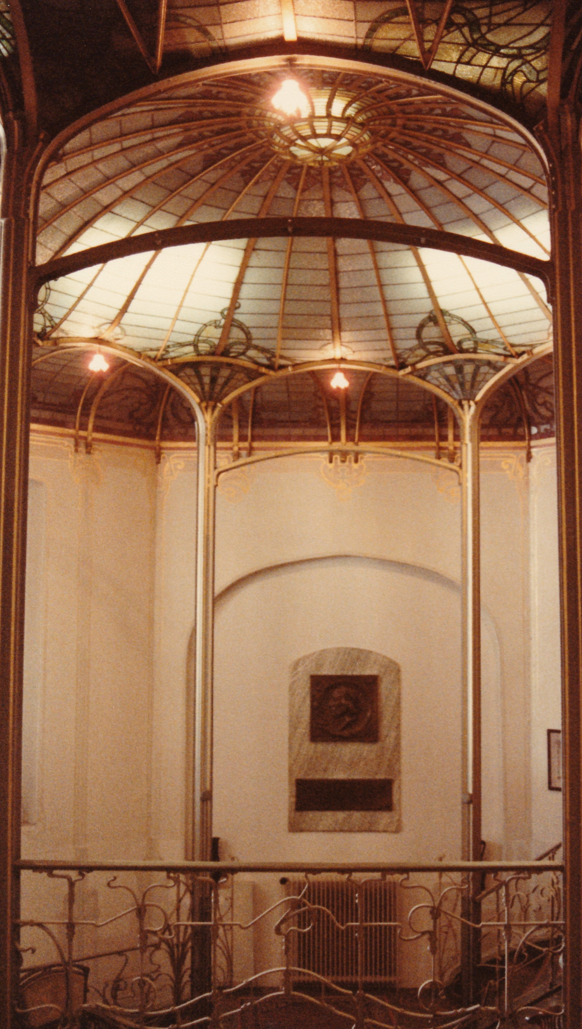 Belgique - Bruxelles - Hôtel Van Eetvelde (Art nouveau - Victor Horta - 1895)